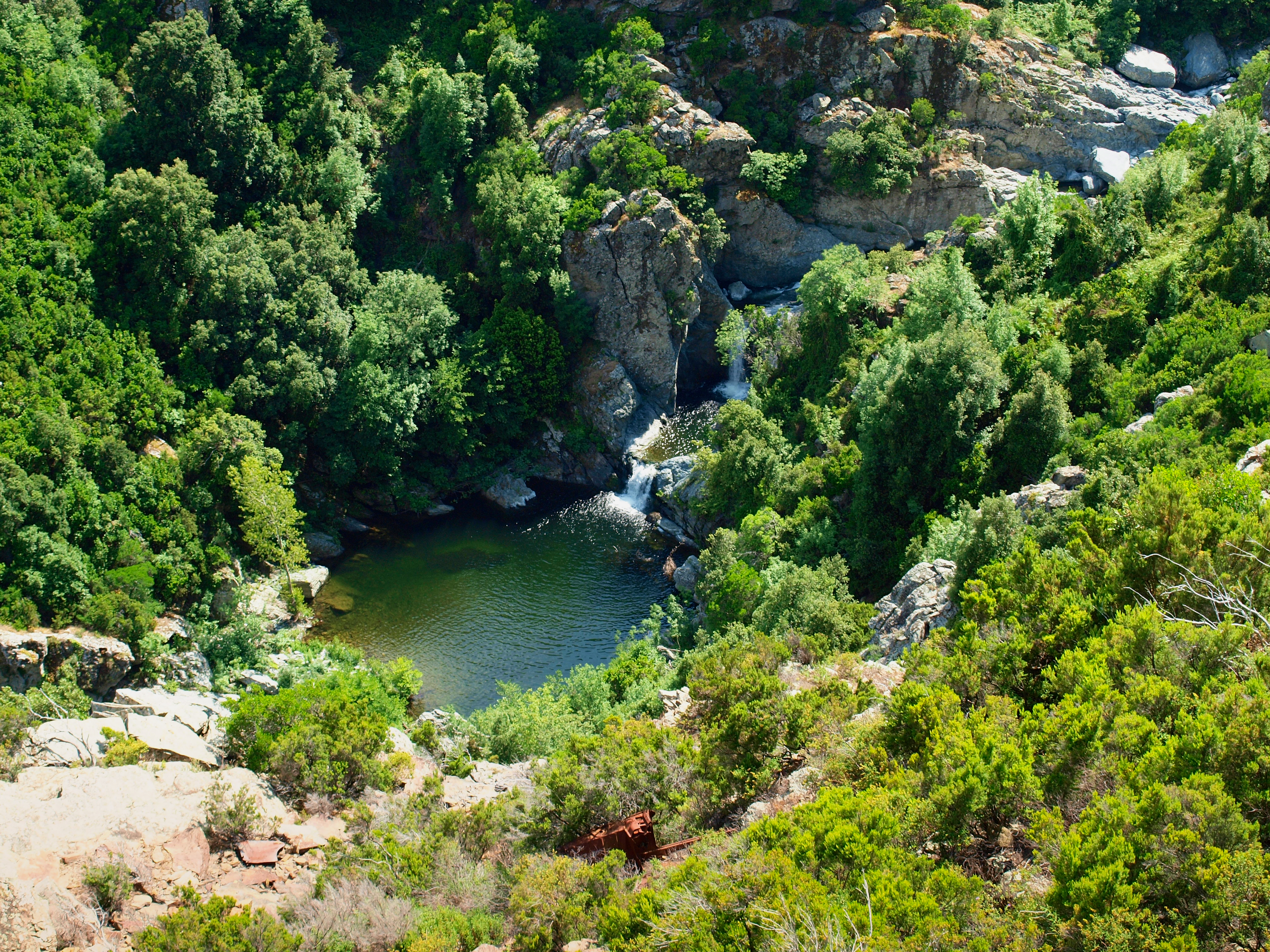 Olmeta-di-Tuda (Corsica) - Le Bevinco dans le défilé du Lancone